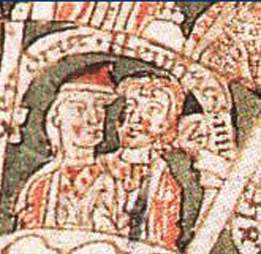 Jindřich X. Bavorský a Gertruda Saská